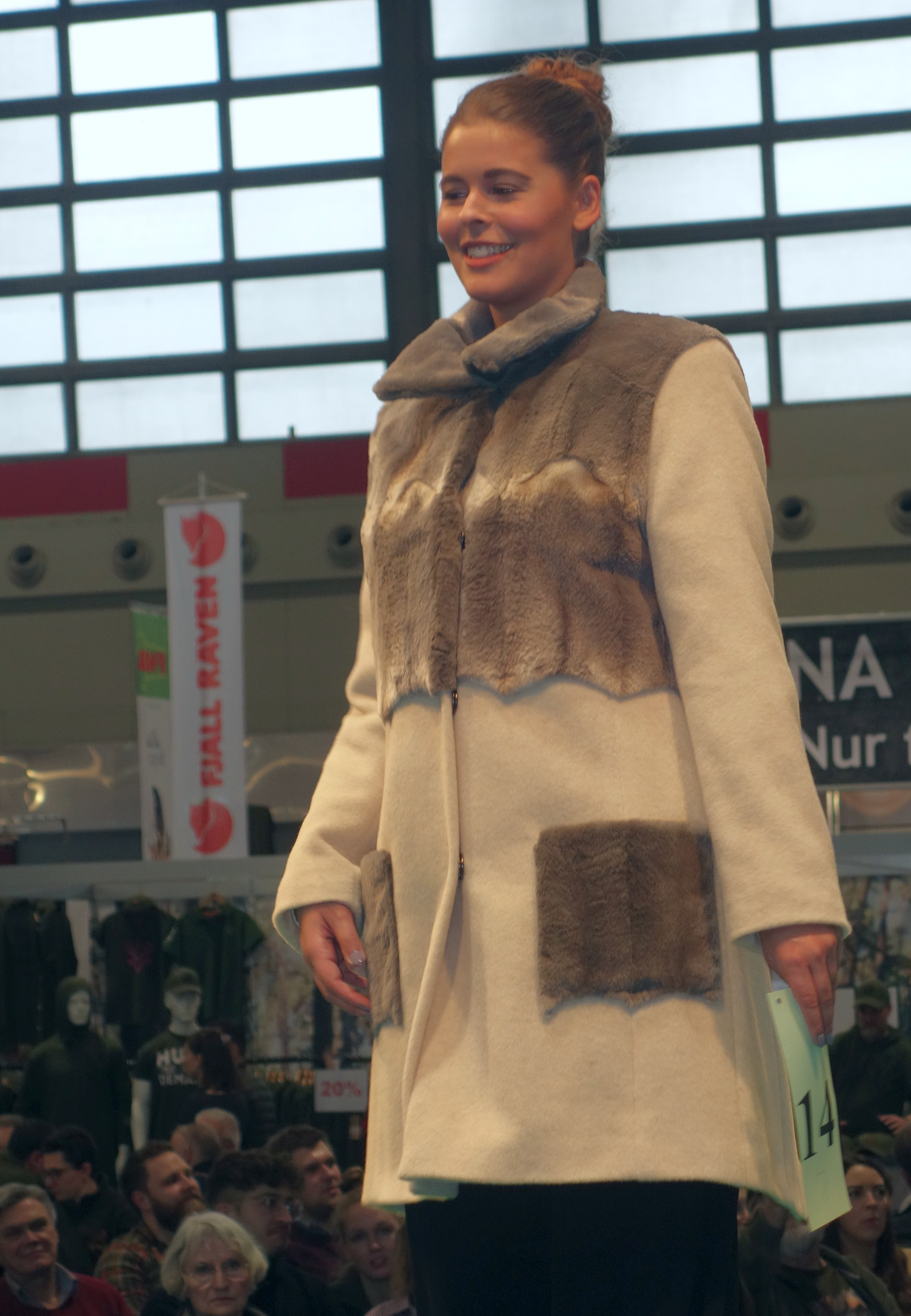 Sandfarbener Alpaka-Kurzmantel mit geschorenem Samtbisamfell. Design: Berchtold Pelz, Fürstenfeldbruck. International German Red Fox Award 2020. Anlässlich der Messe „Jagd & Hund“ 2020, Dortmund, Westfalenhalle.